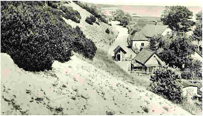 Widok miejscowości Polski (Narmeln) ok. 1933 r.